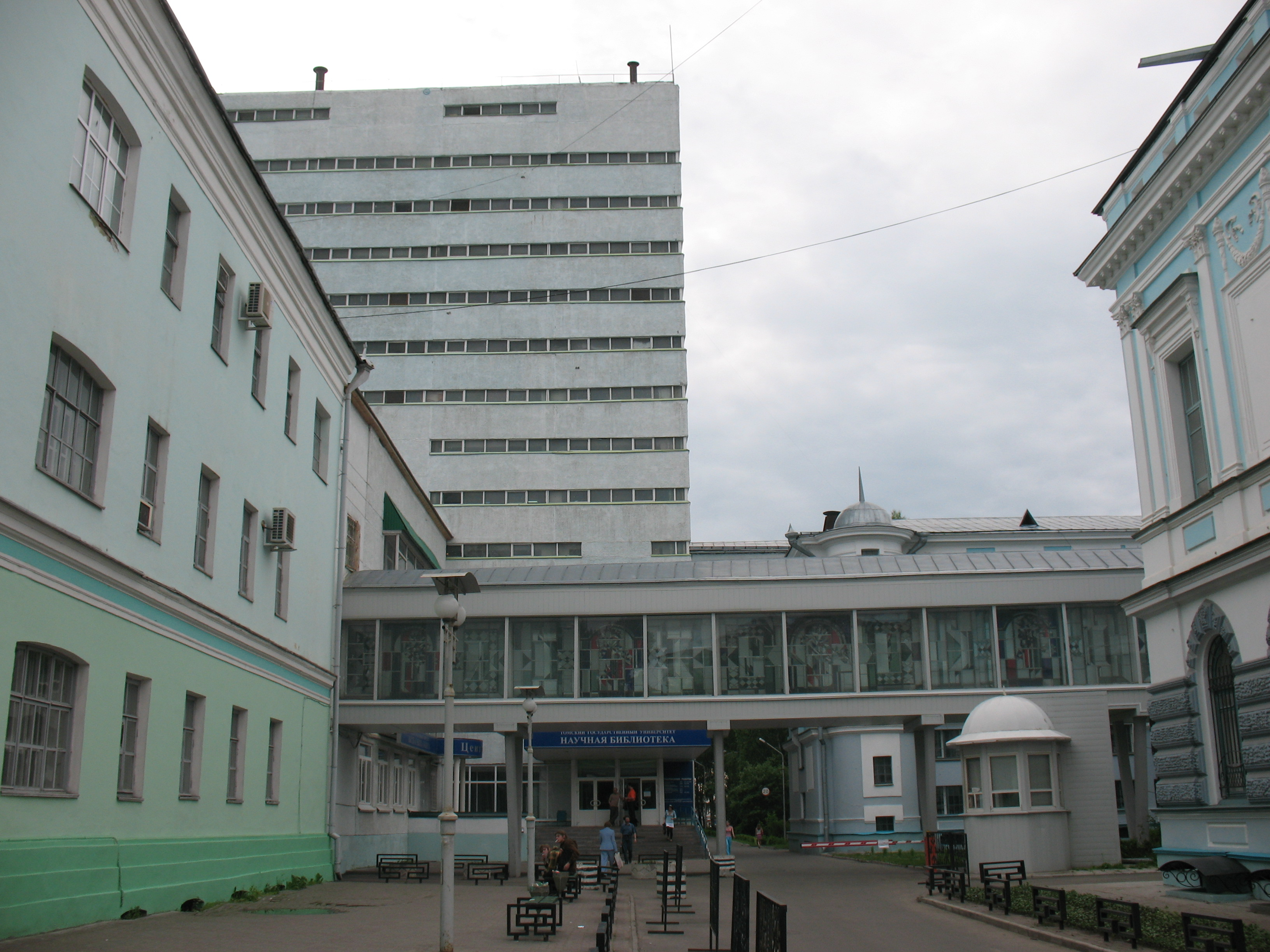 Вид на новое здание библиотеки Томского Государственного Университета